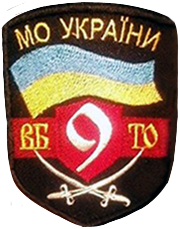 Емблема 9 б ТрО.